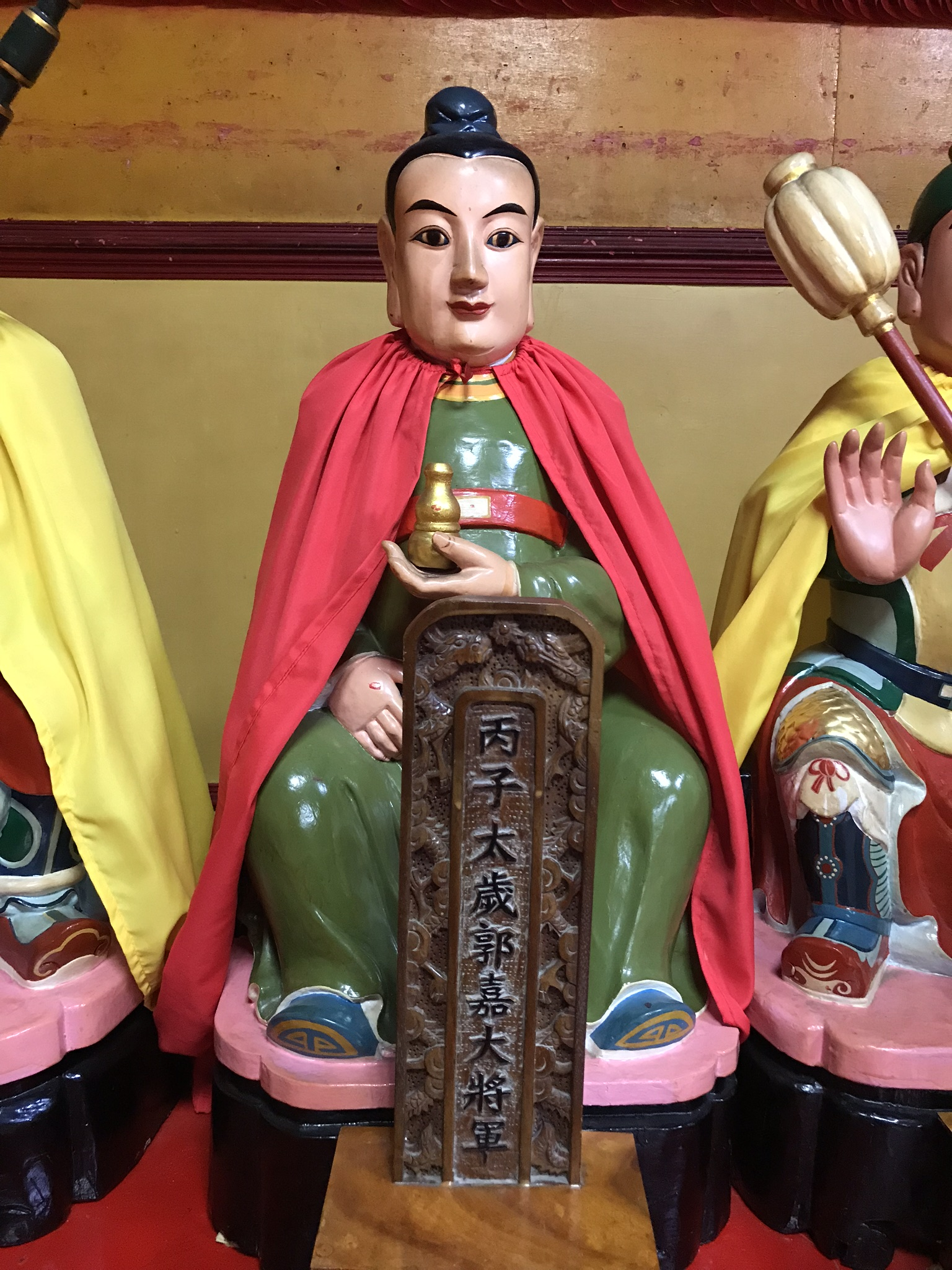 丙子太歲郭嘉大將軍神像